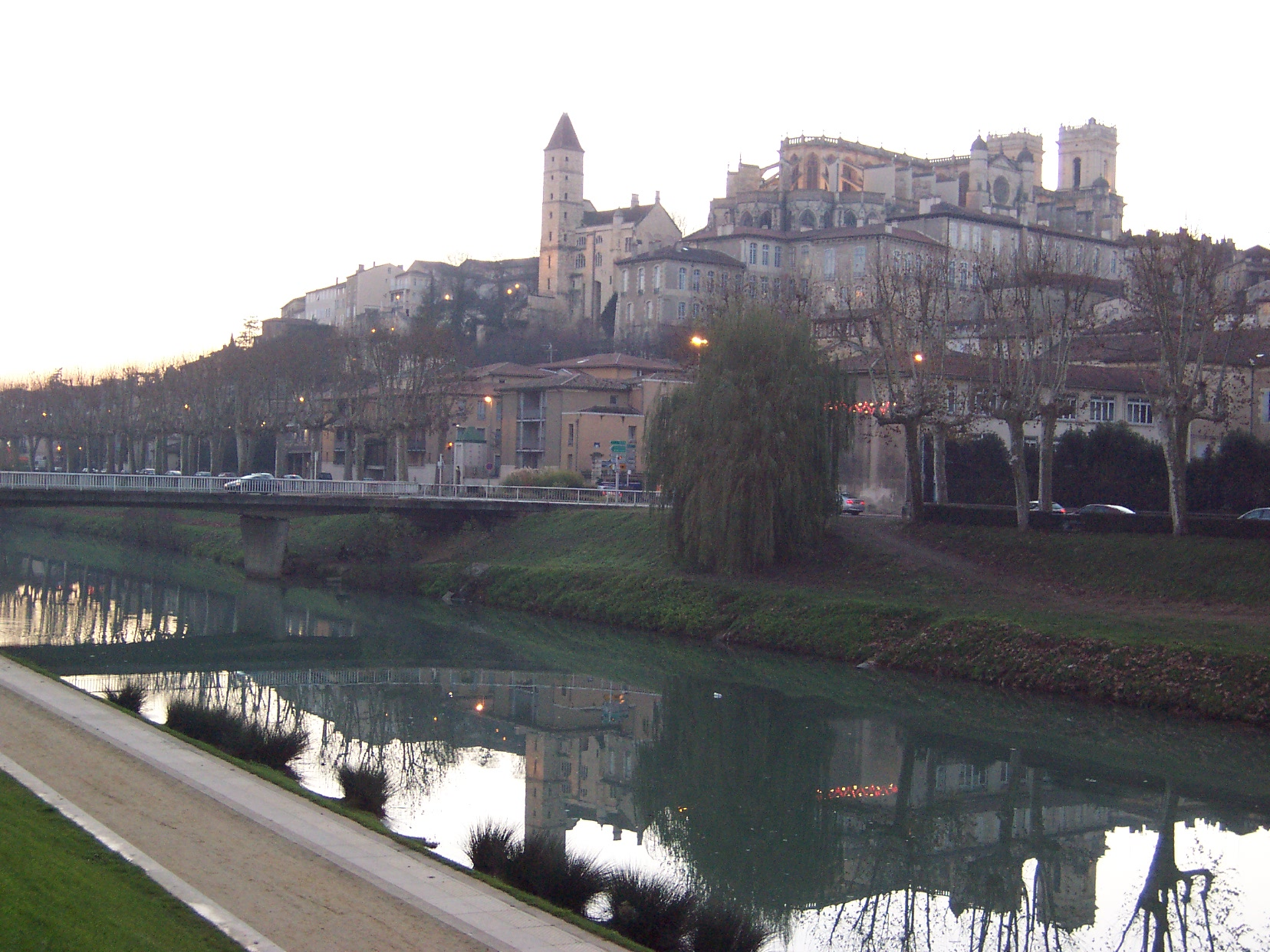 Vieille ville d'Auch.